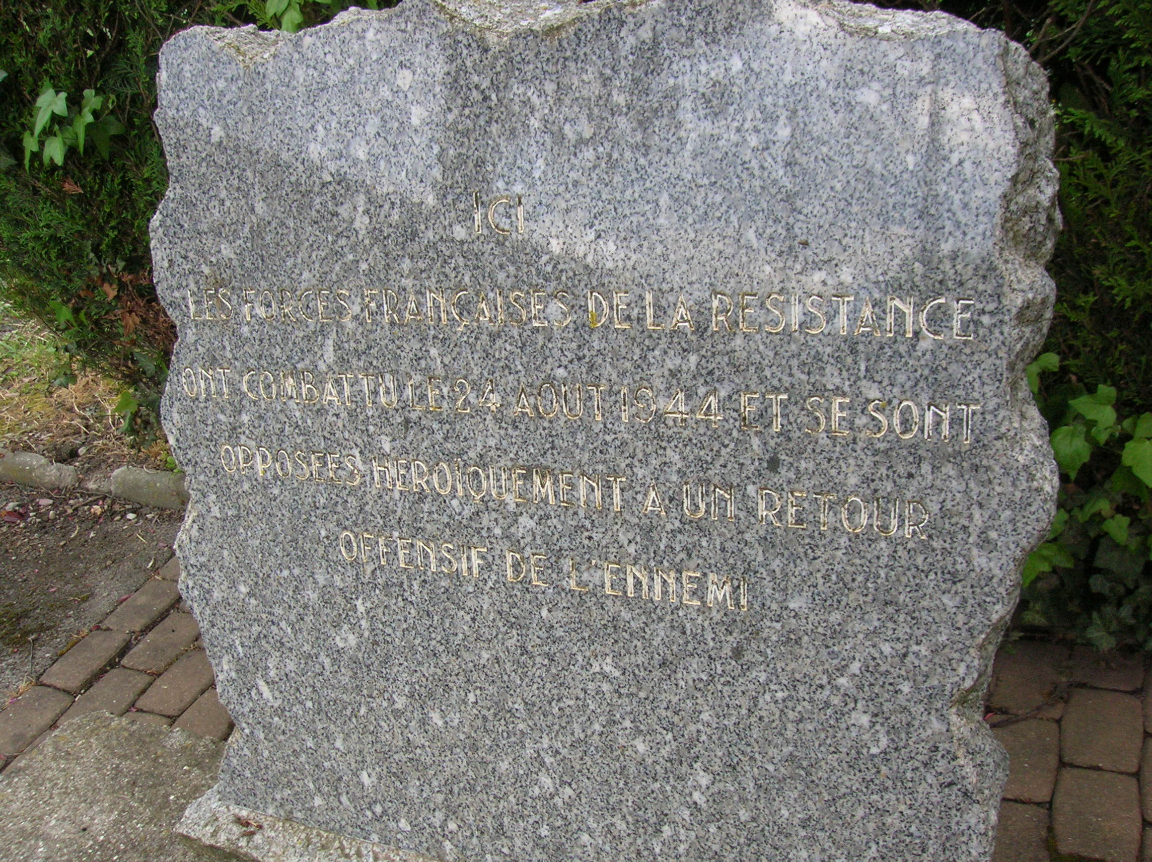 monument aux morts, à Champrondet, pour la Bataille de Gières en août 1944. Gières, Isère, France.